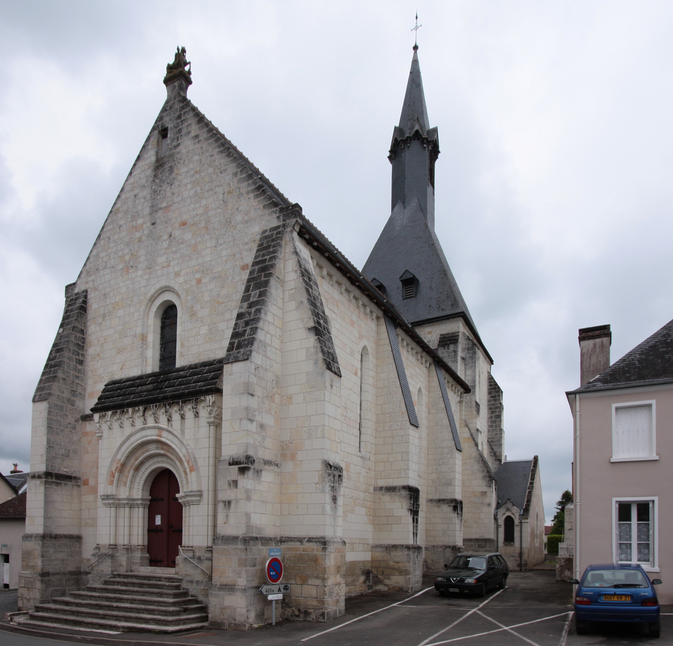 Stiftskirche Saint-Martin in der Gemeinde Nouans-les-Fontaines im Departement Indre-et-Loire/Frankreich.